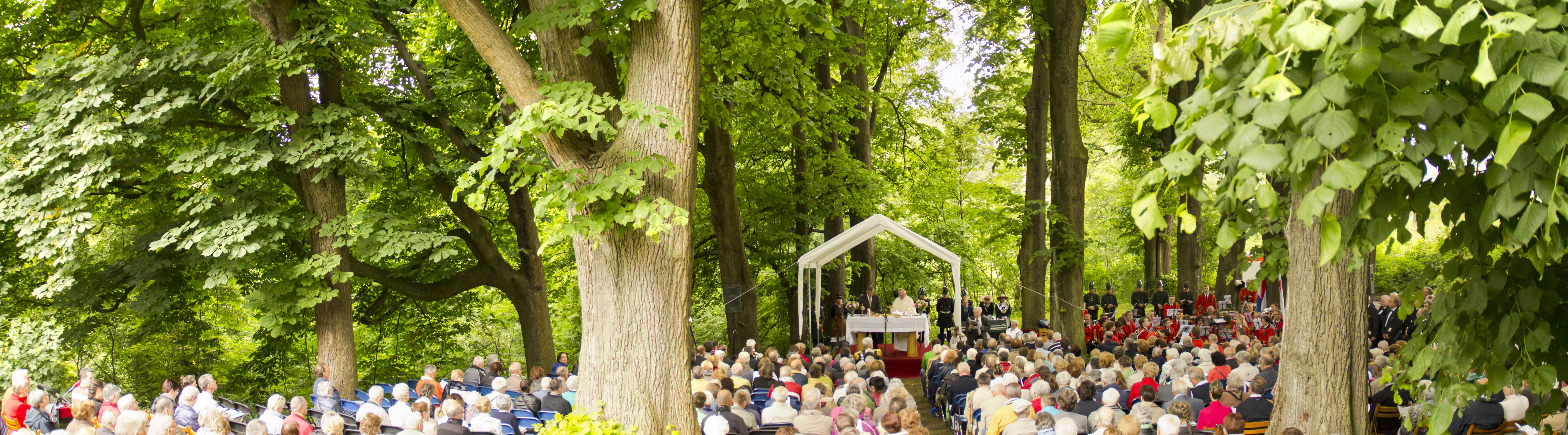 Sjaasbergergank